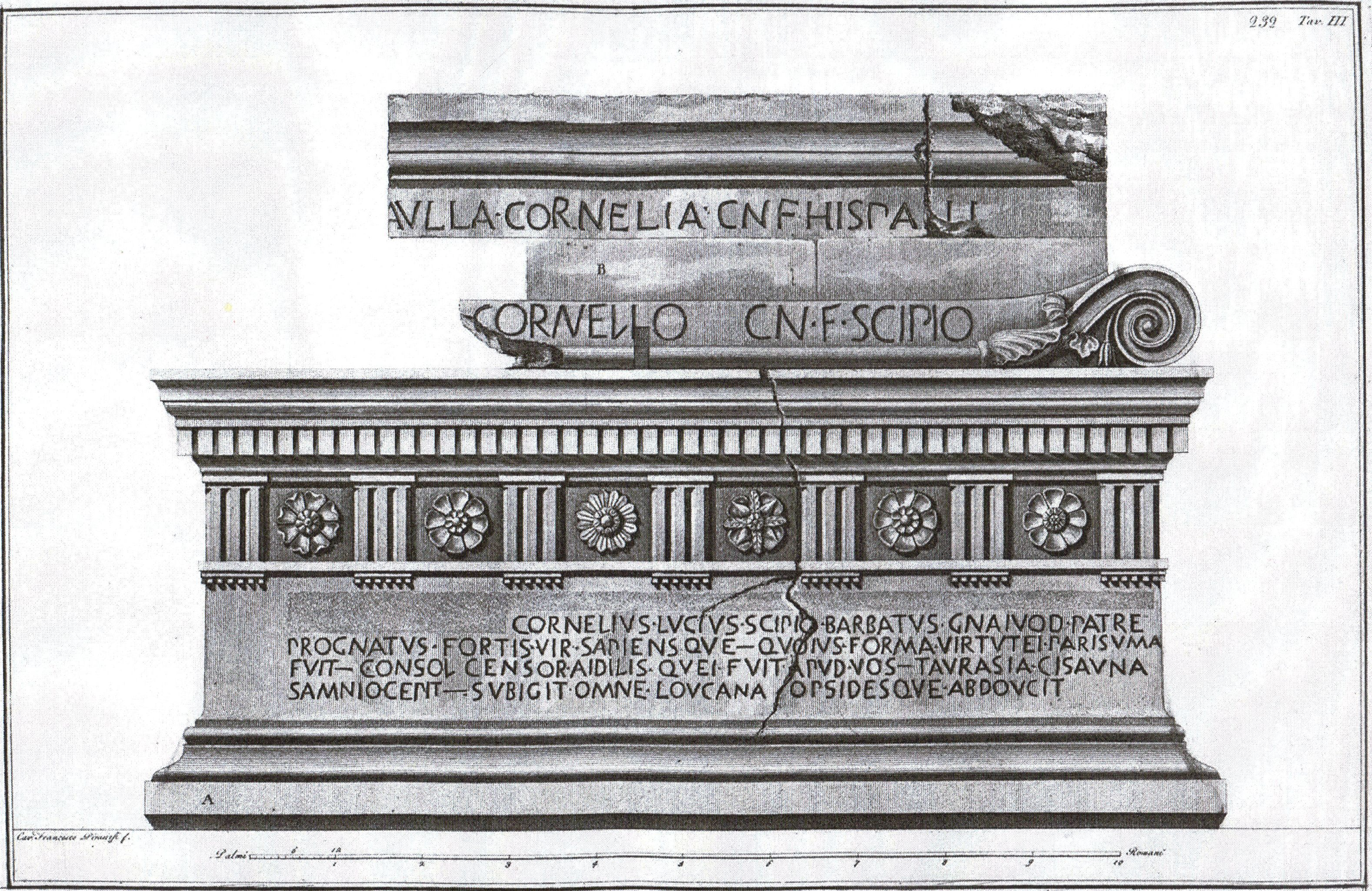 Sarkophag des Scipio Barbatus